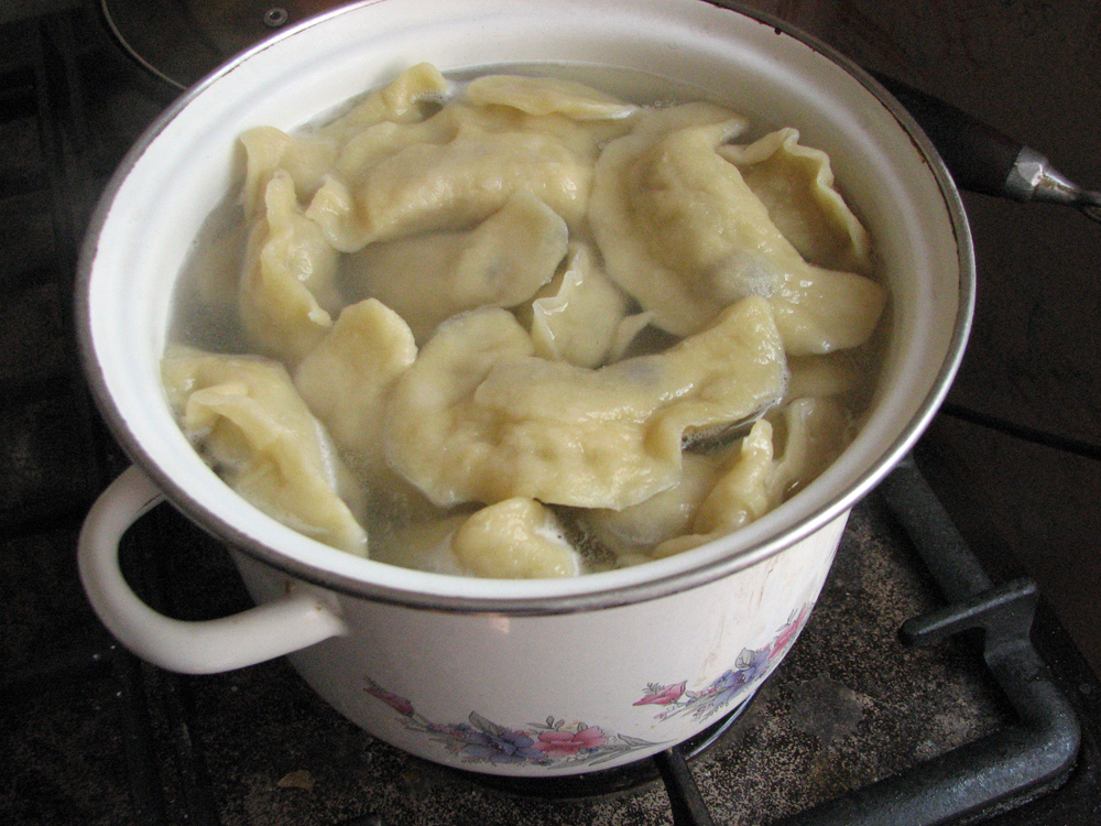 Вареники с вишней